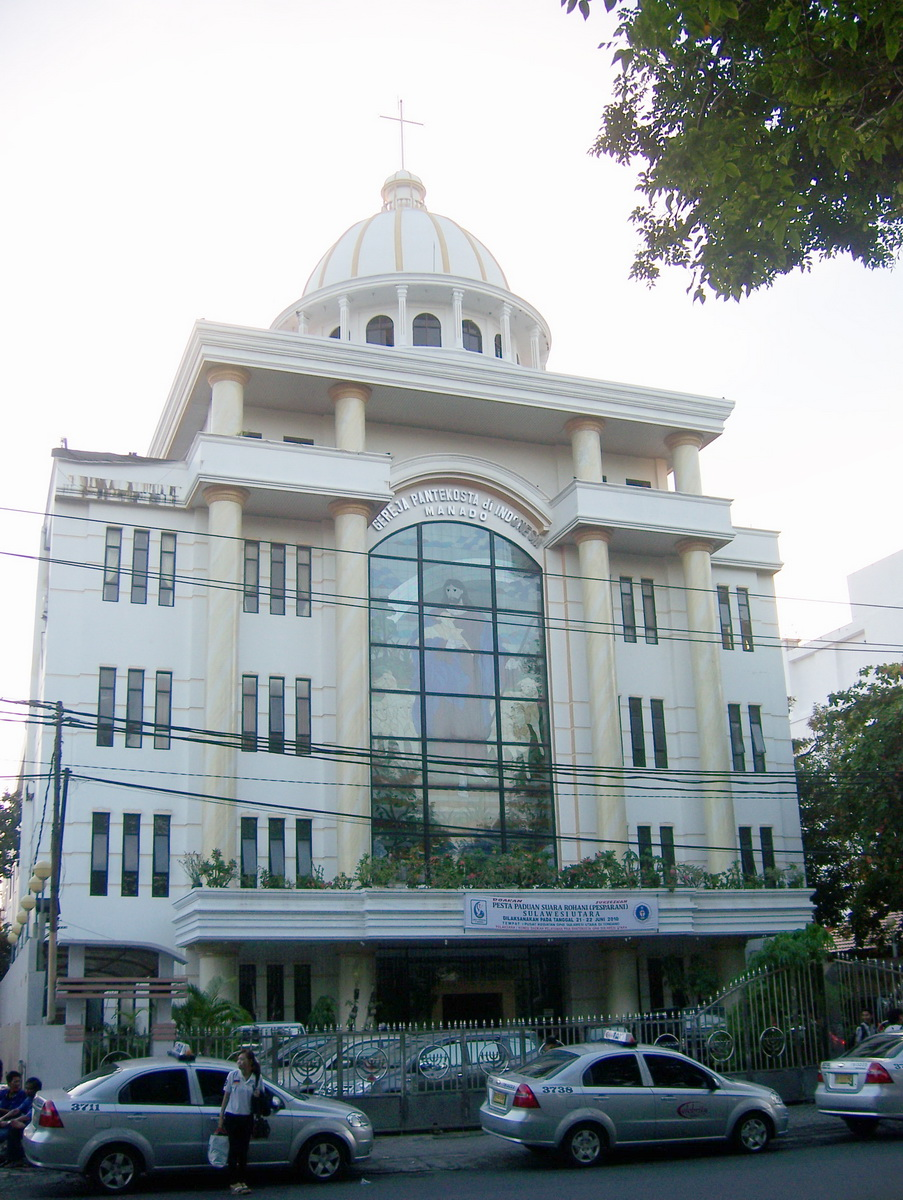 Gereja Pantekosta di Indonesia (GPdI) Manado